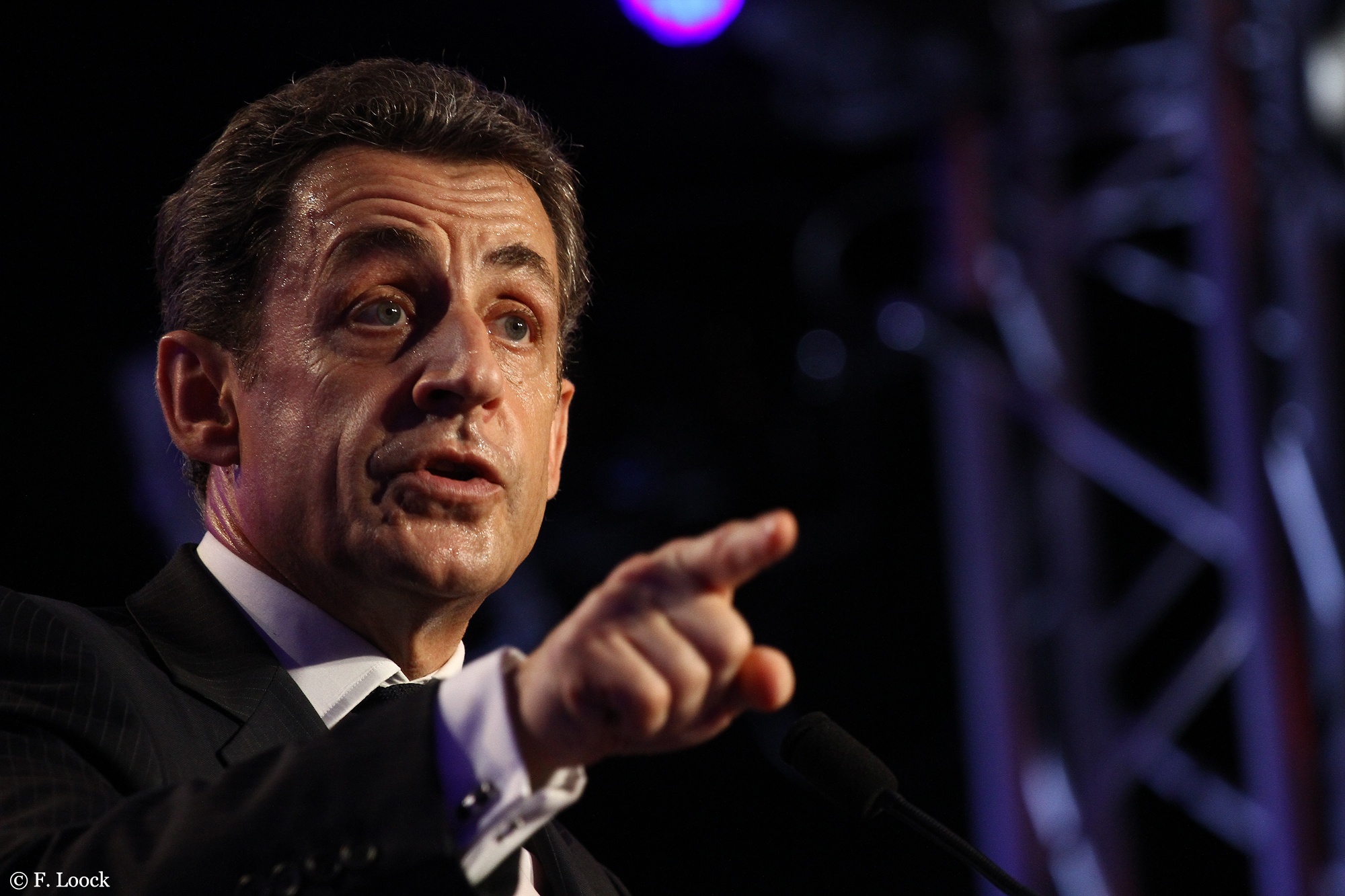 Meeting de Nicolas Sarkozy pour le 2° tour des élections présidentielles françaises au Raincy, Seine St Denis, France.